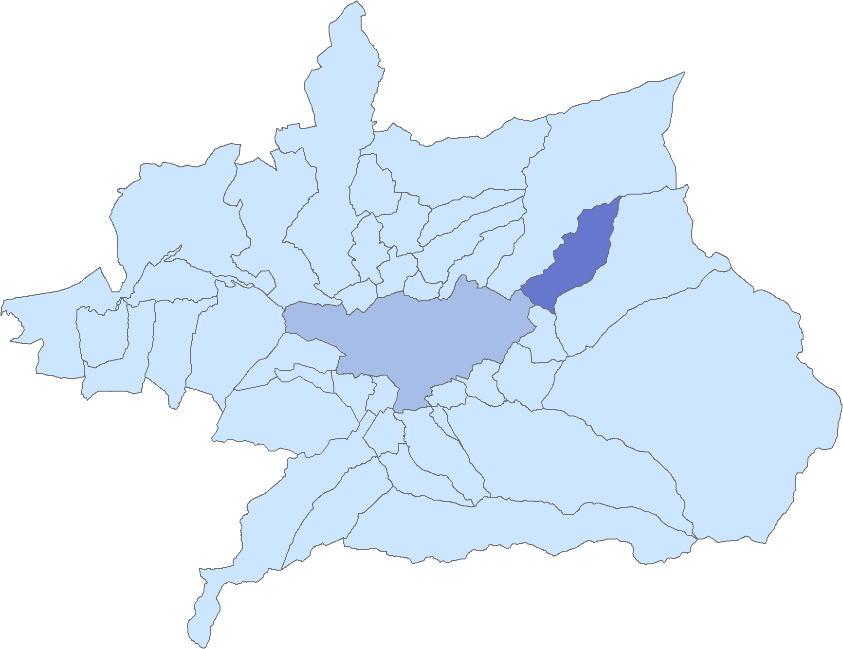 Situación del municipio de Beas de Granada respecto a la comarca de la Vega de Granada, en España.